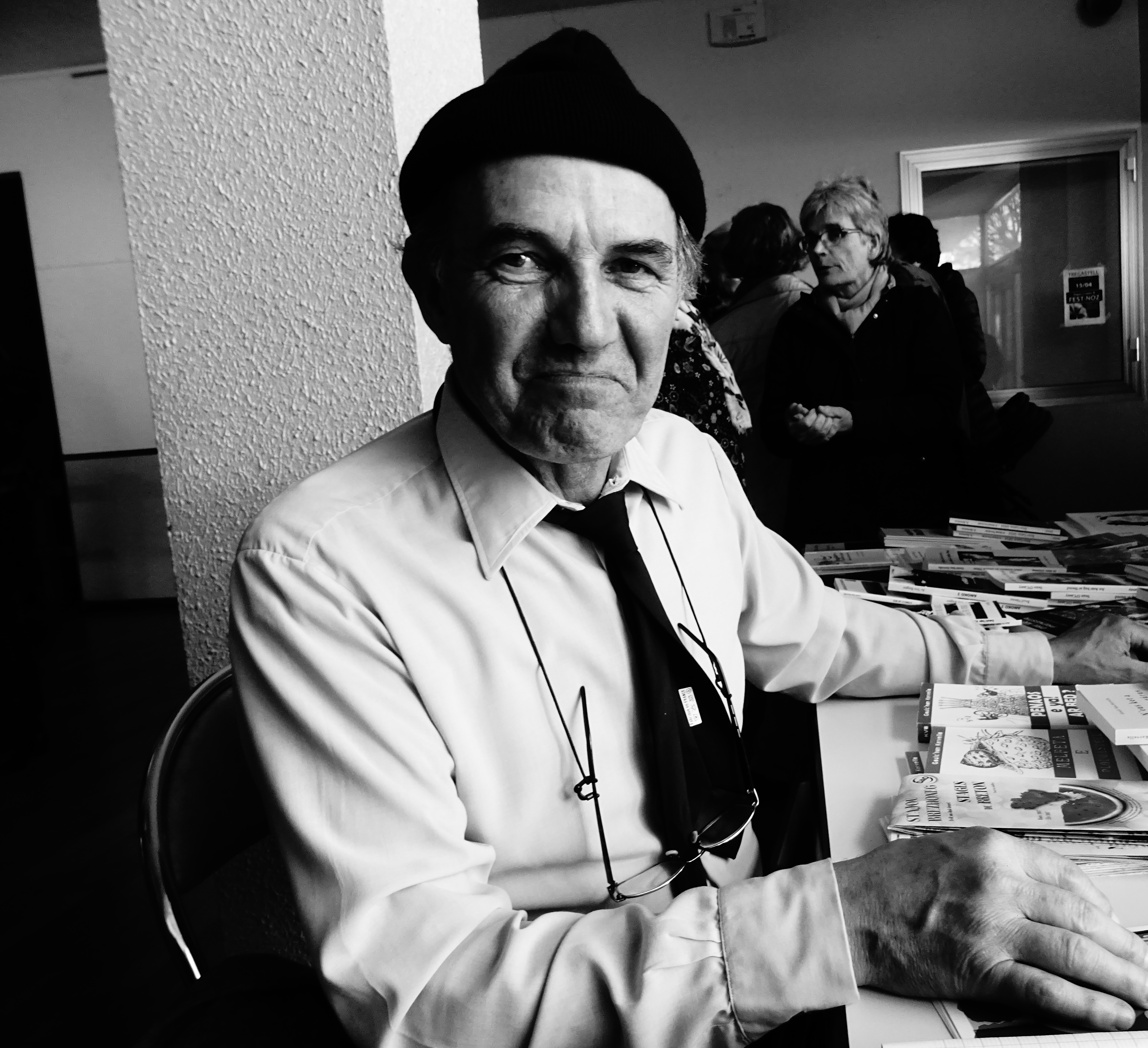 Emañ Goulc'han Kervella o sinañ levrioù goude pezh-c'hoari "Kof ha kof".Tregastell 2-04-2017.